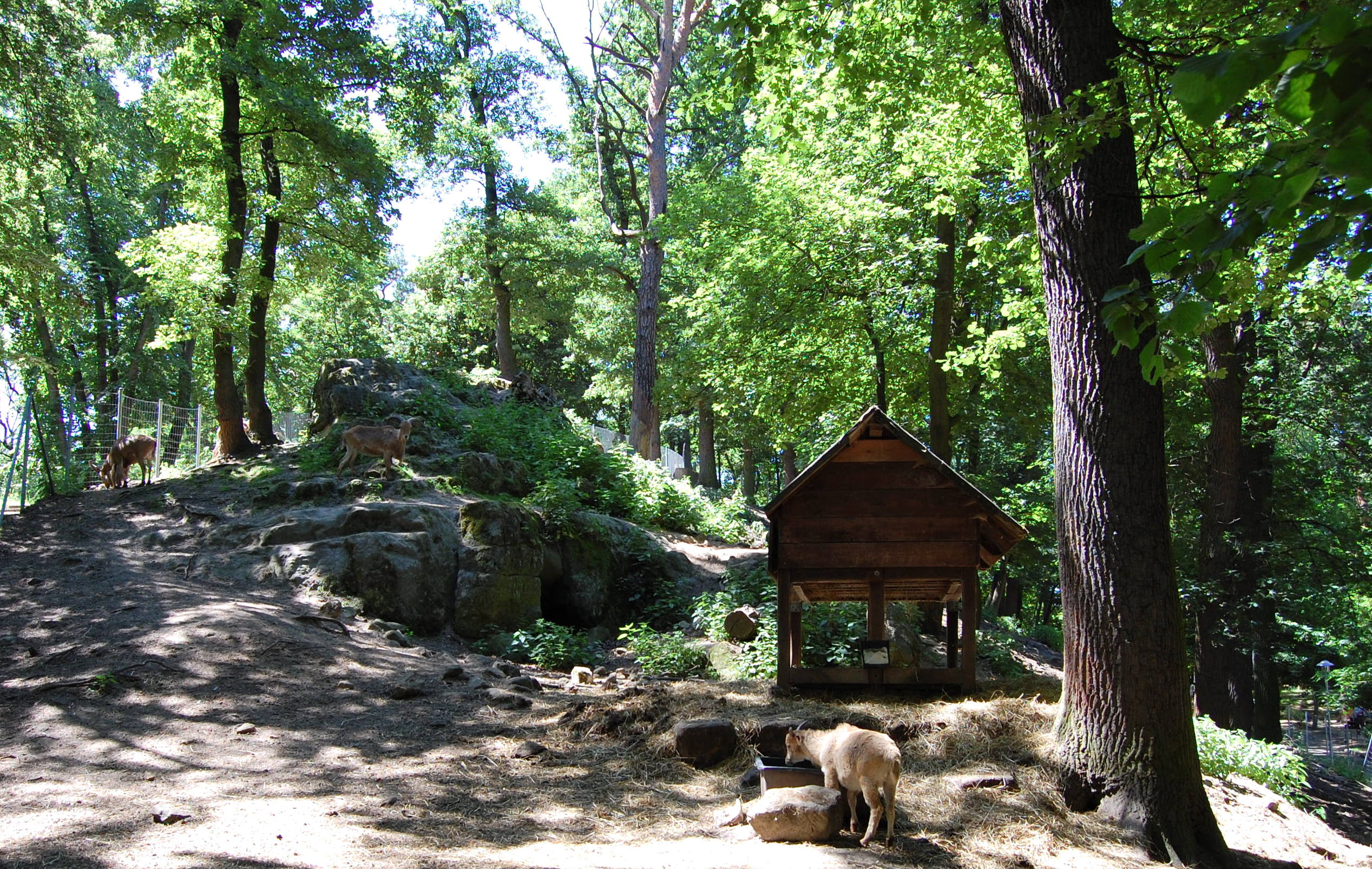 Gehege für Ziegen im Tierpark Halberstadt